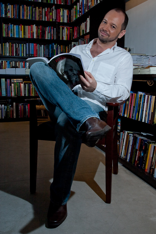 Poeta Cássio Junqueira fotografado na cidade de São Paulo